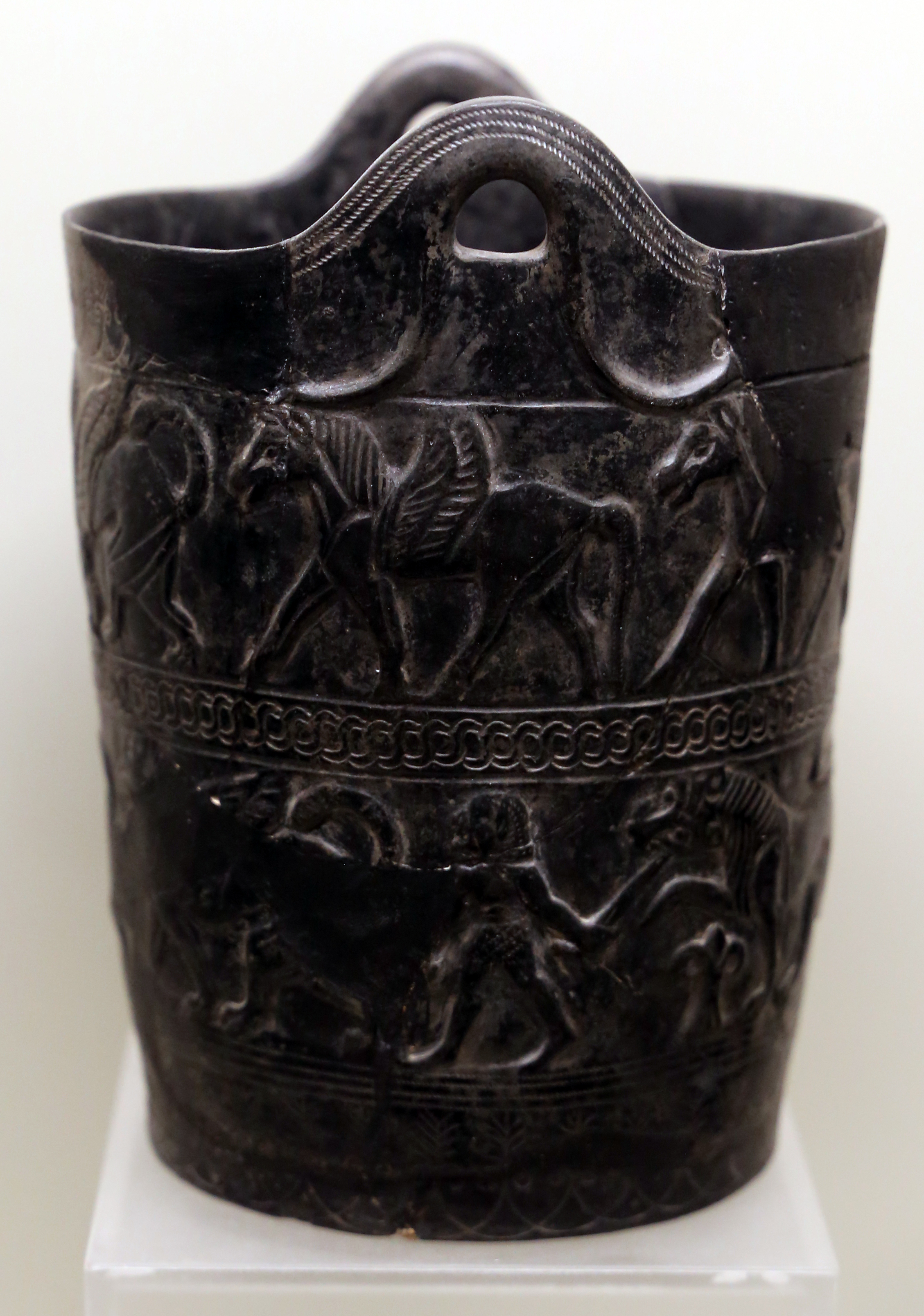 Villa Giulia (Rome) This is a photo of a monument which is part of cultural heritage of Italy.